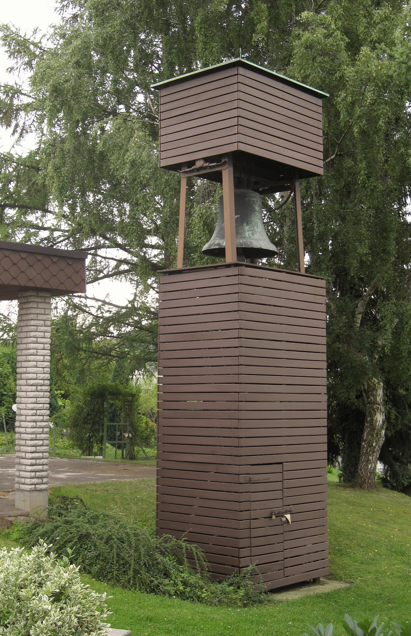 Glocke der ehemaligen Vituskirche im Glockenturm am Paul-Schneider-Haus in Hemer.